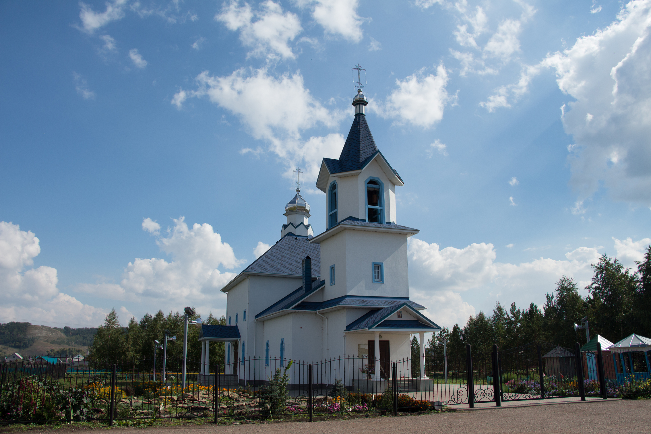 Крестовоздвиженская церковь (Республика Башкортостан, Туймазы, село воздвиженское)